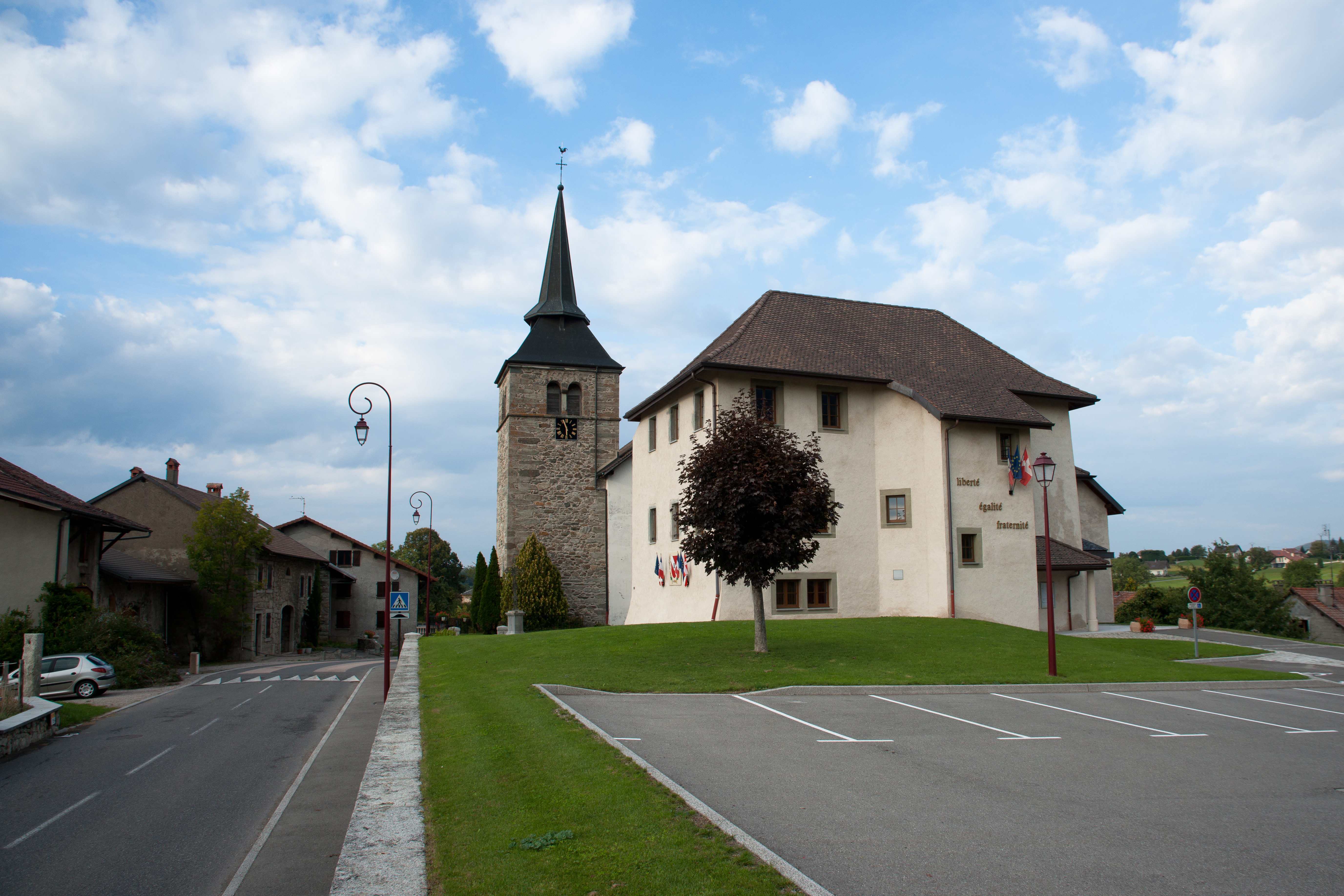 Draillant - Mairie et église